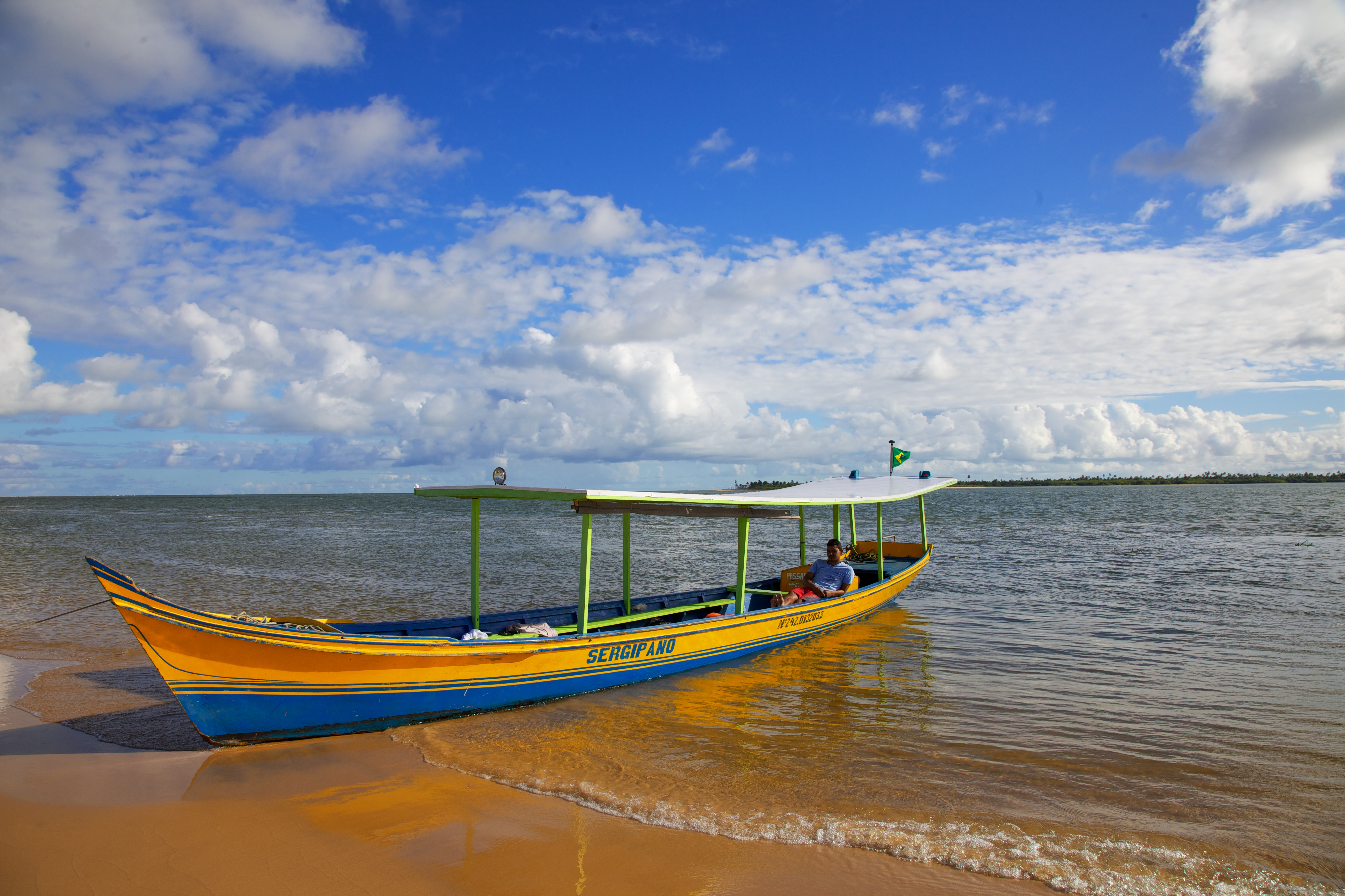 Rio São Francisco / Alagoas iBook | | 500px | Creative Commons 3.0